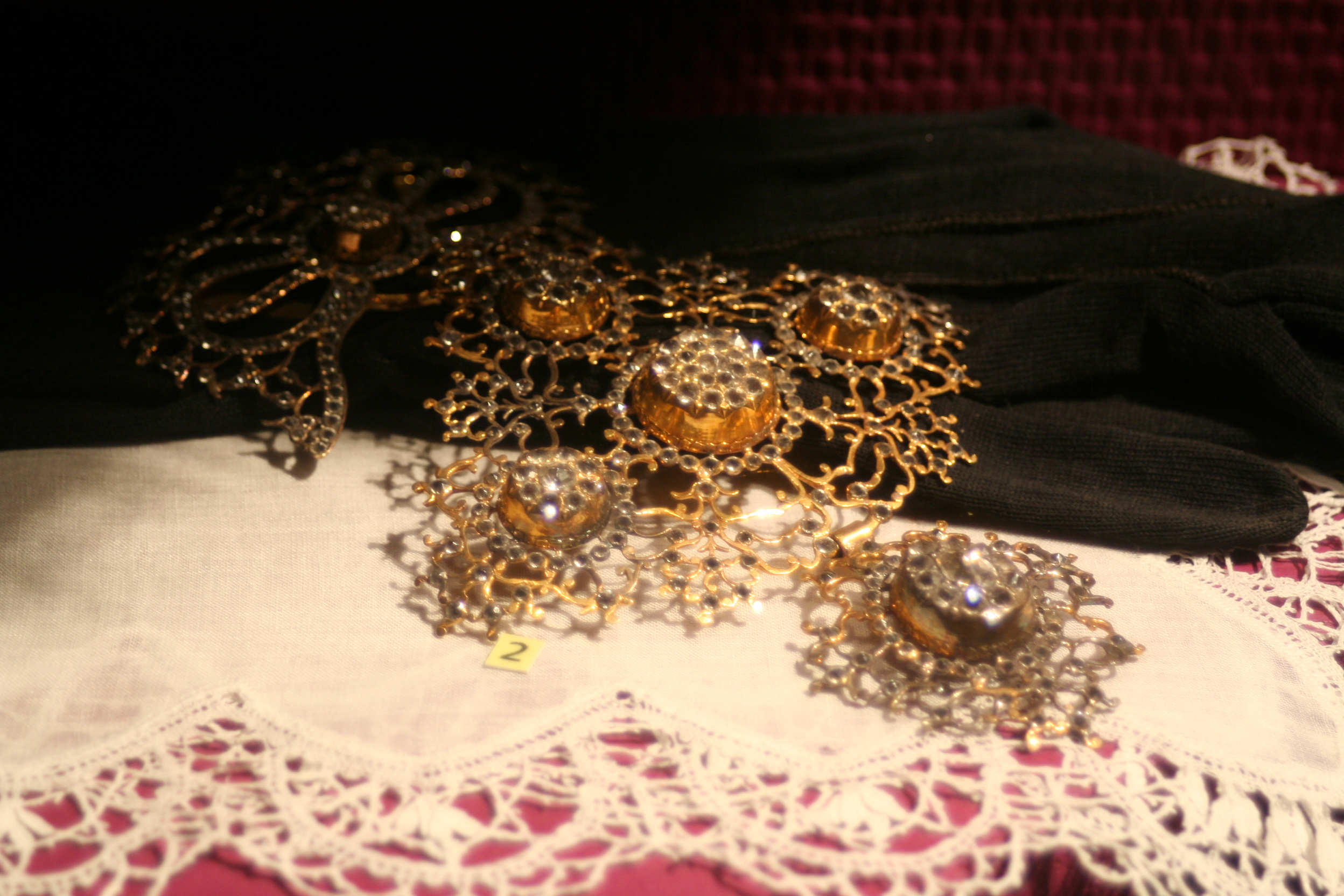 bijou au musée de Normandie, Caen